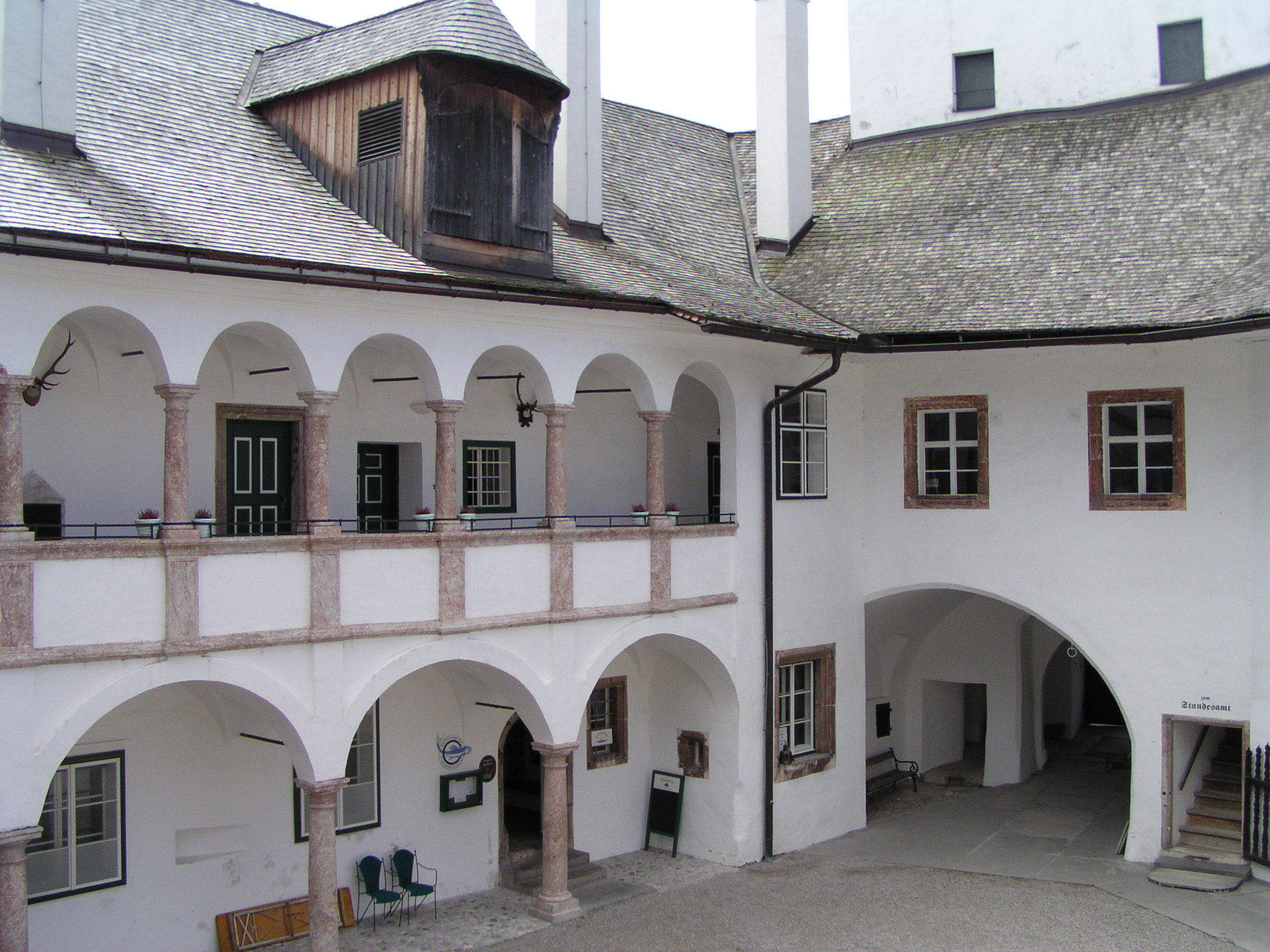 Schloss Ort am Traunsee bei Gmunden, Österreich